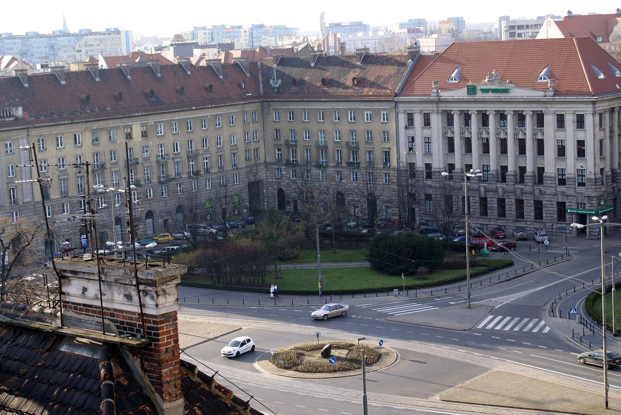 Wrocław, układ urbanistyczny rejonu placu Kościuszki, 1807